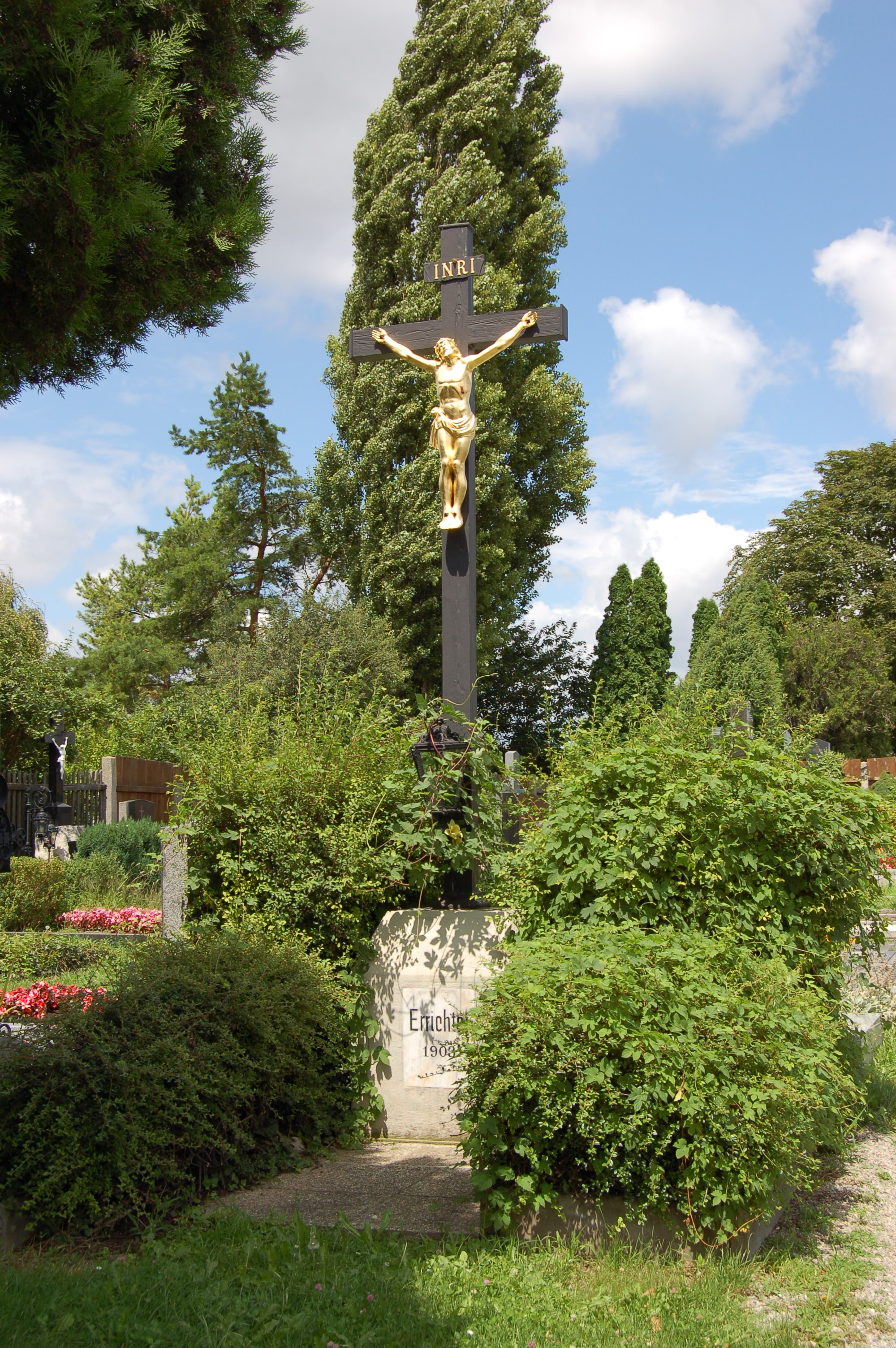 Friedhof Stammersdorf-Ort, Friedhofskreuz, errichtet 1903